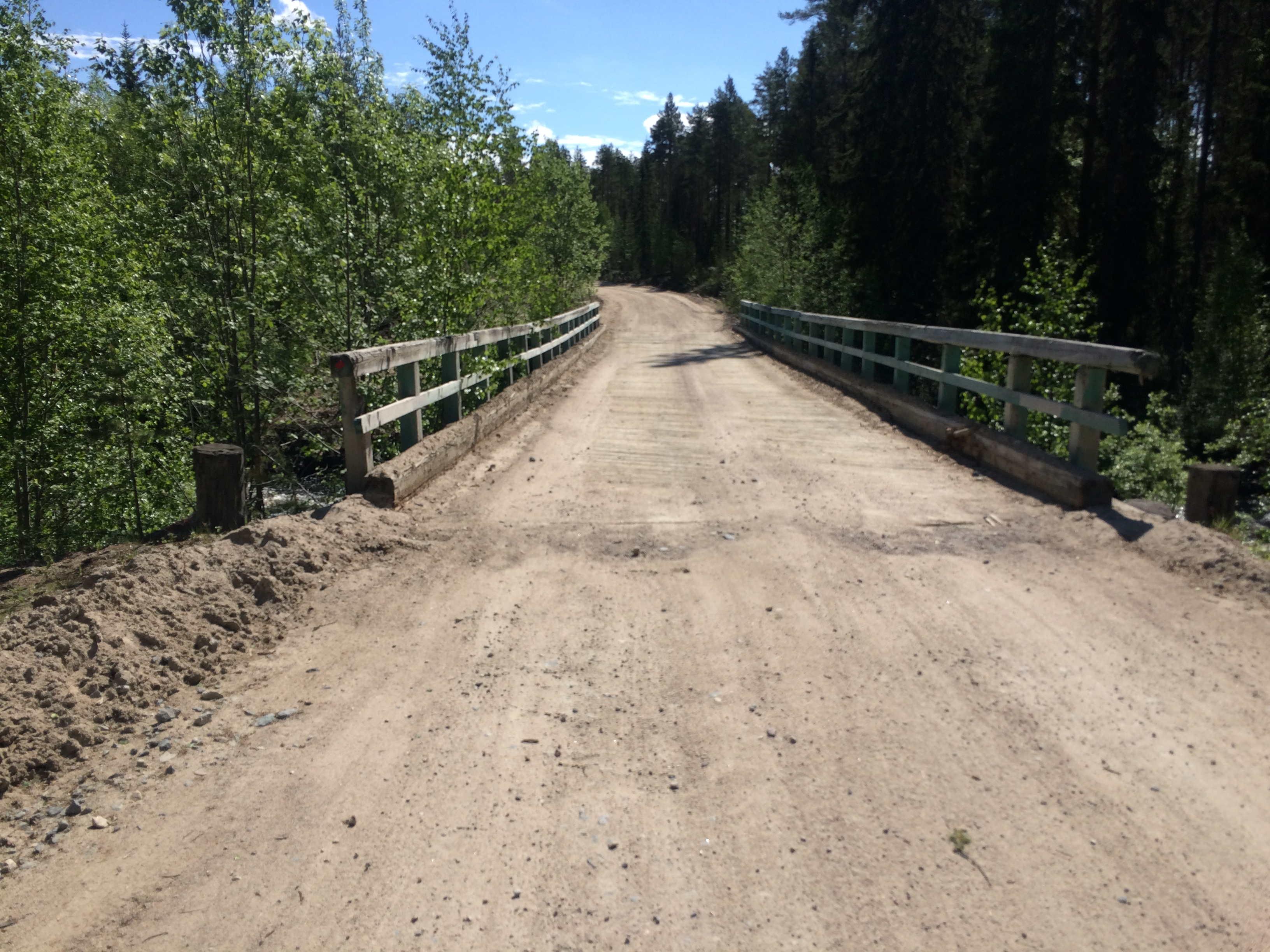 Аррейоки